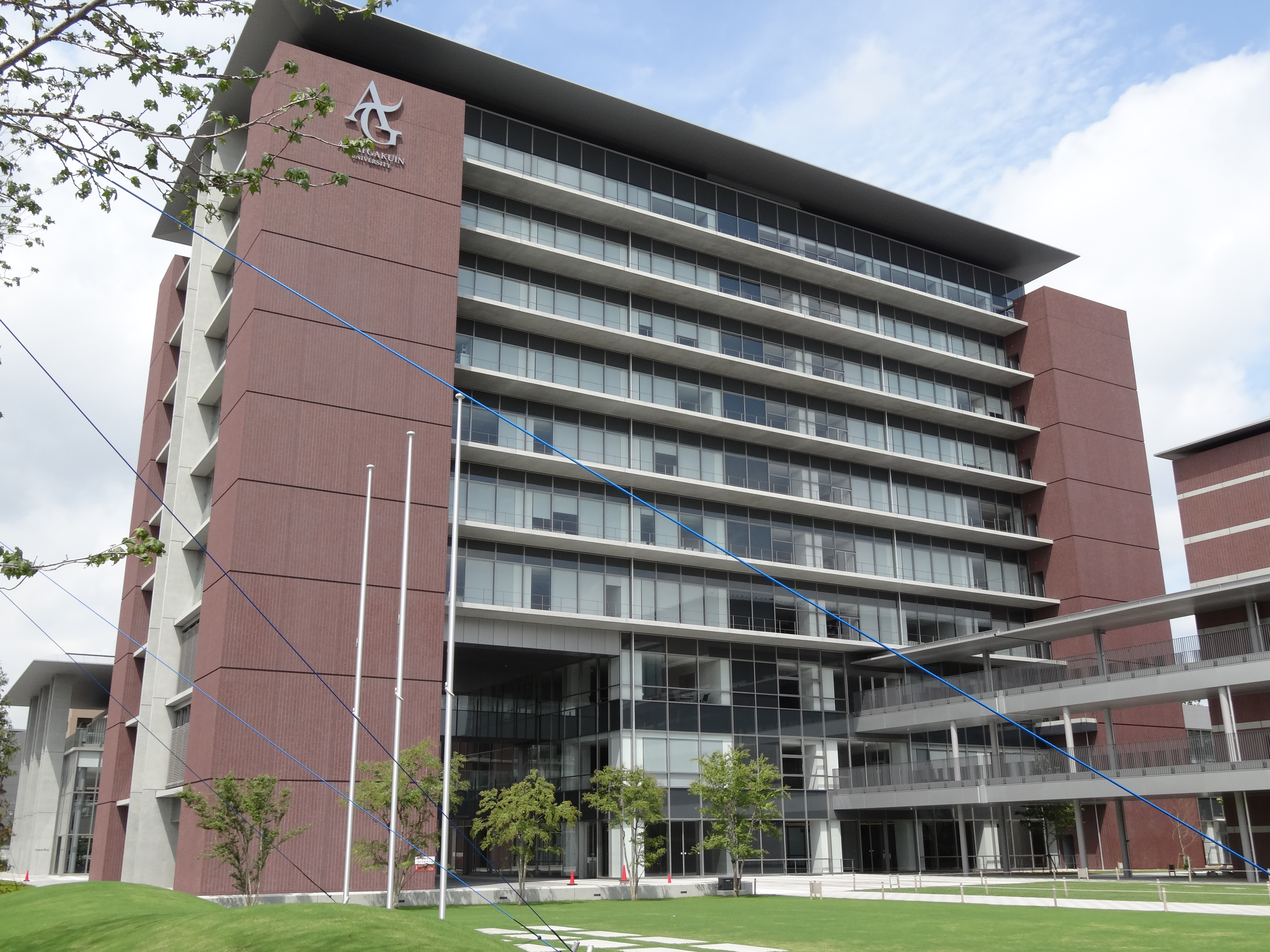 愛知学院大学名城公園キャンパス アガルスタワー